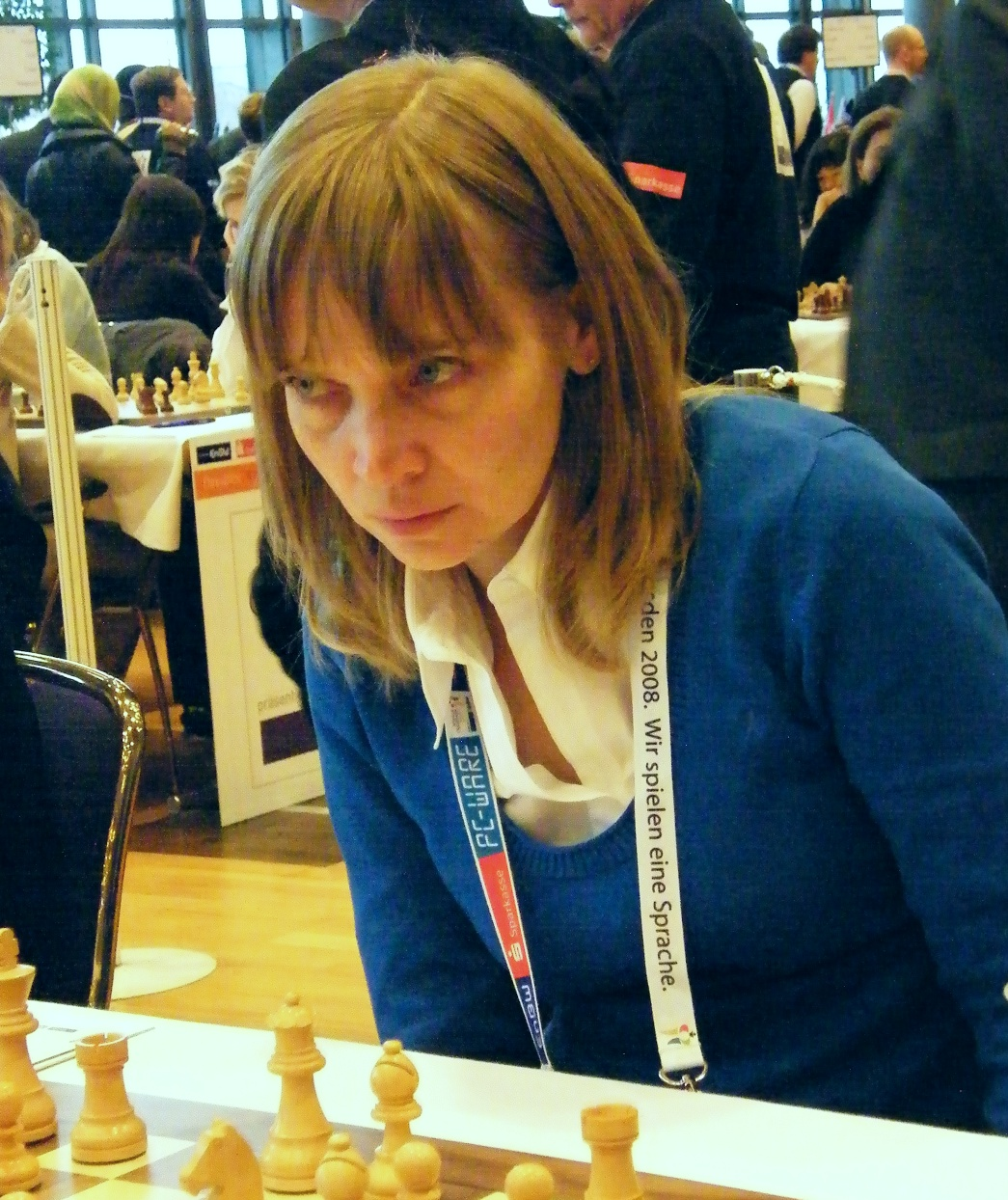 Elena Sedina bei der 38. Schacholympiade in Dresden 2008